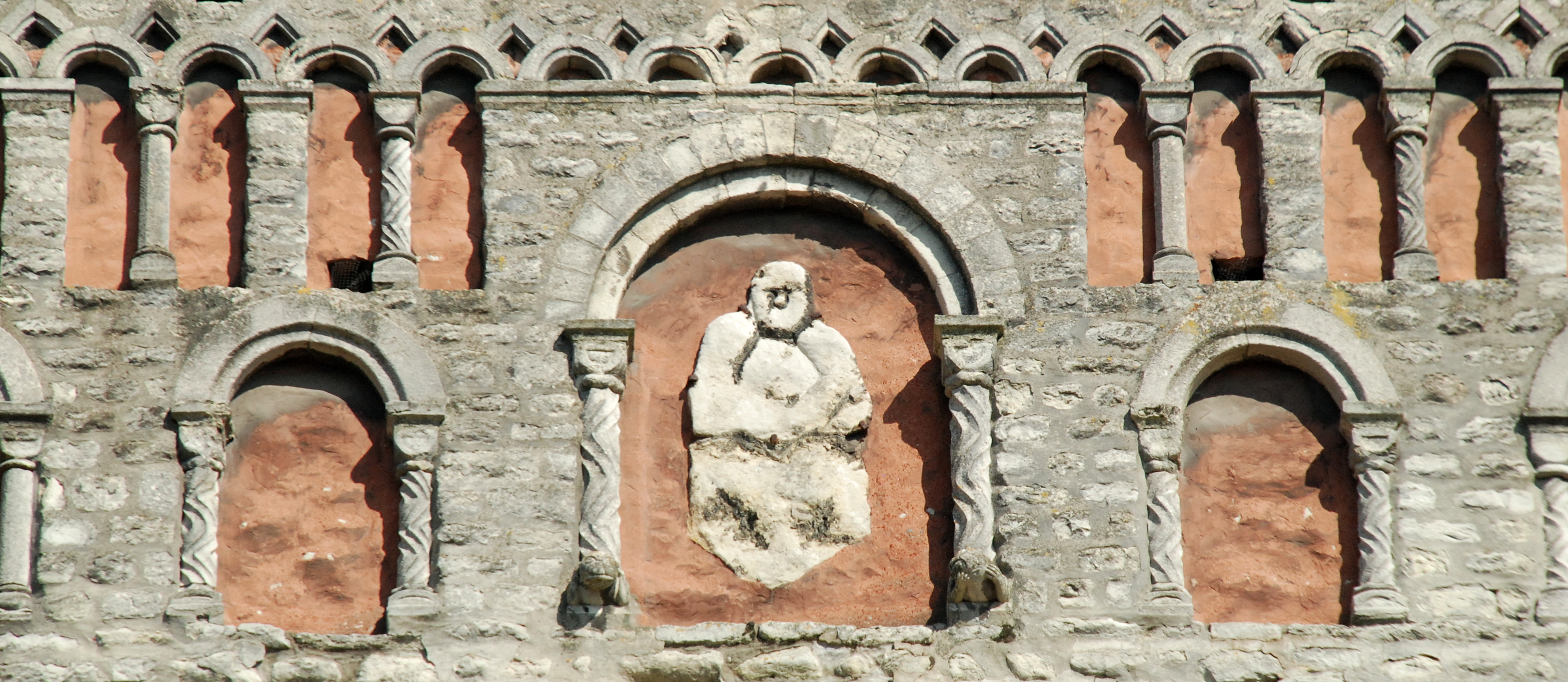 Belgique - Brabant wallon - Nivelles - Collégiale Sainte-Gertrude